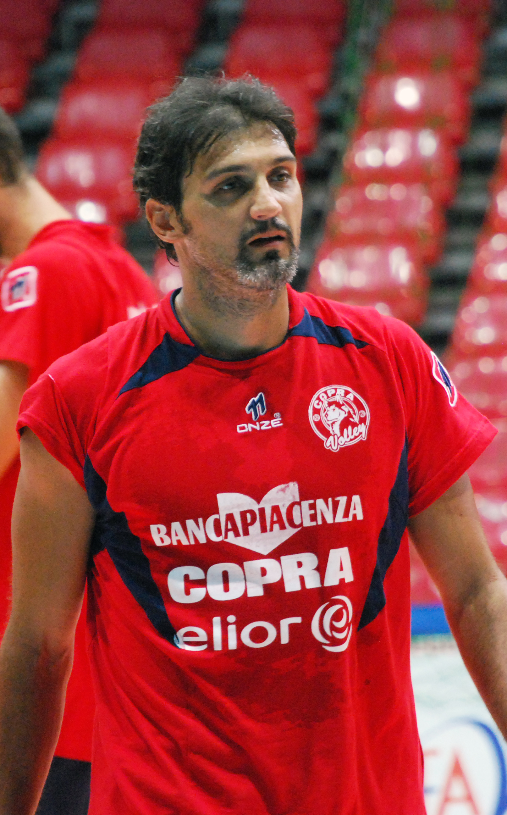 Foto che ho scattato al Palabanca di Piacenza in occasione di una amichevole